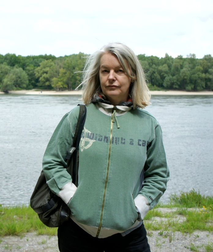 Marlene Streeruwitz, österrikisk författare.